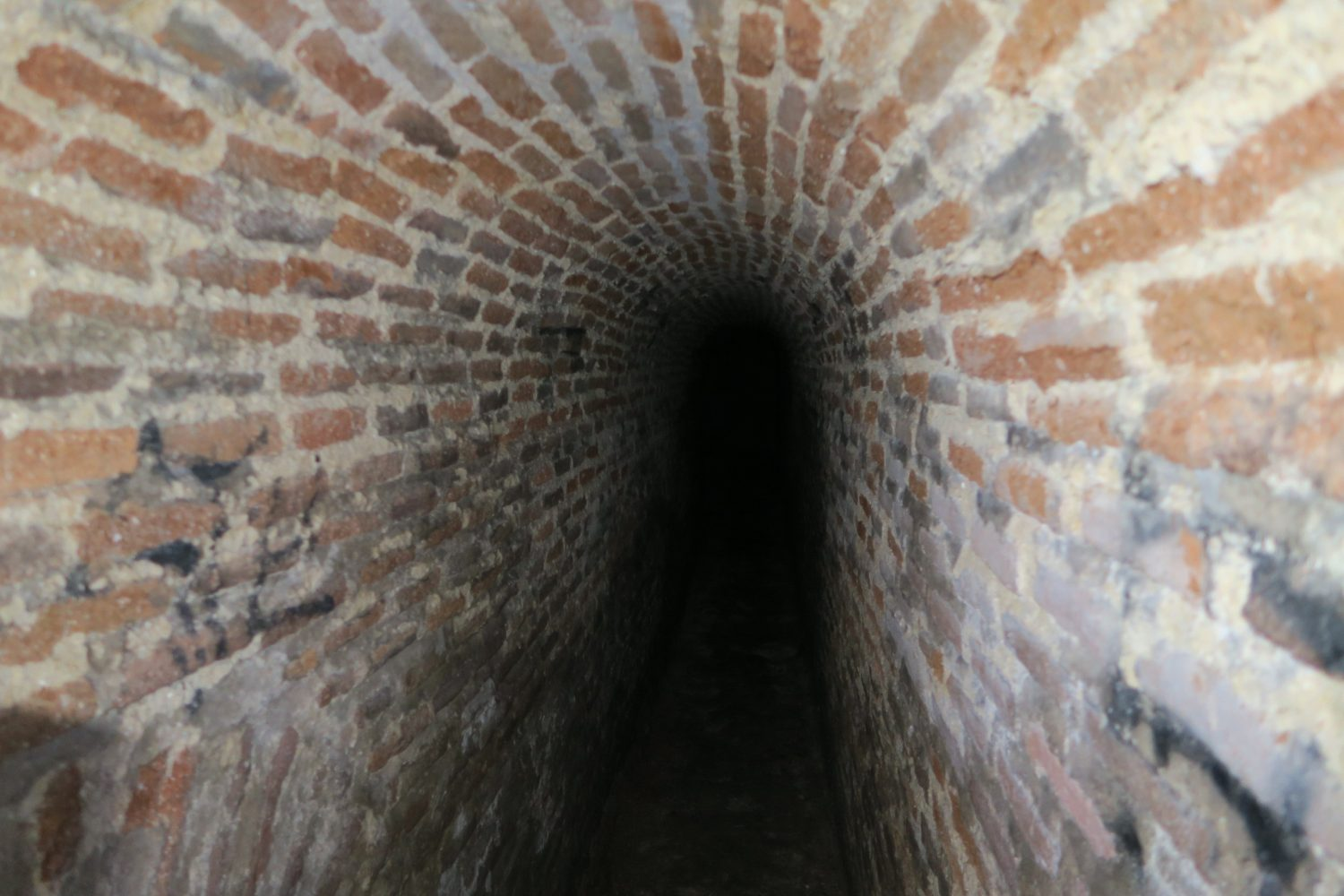 Su nombre procede de la antigua Dehesa de Amaniel, situada en la actual Dehesa de la Villa, que era donde se captaba el agua del nivel freático. El acceso a las galerías se localiza en el parque del Paseo de Juan XXIII, a la altura del número 23 de dicha vía urbana, cuya construcción en 2005 dejó al descubierto las galerías y el arca de distribución.